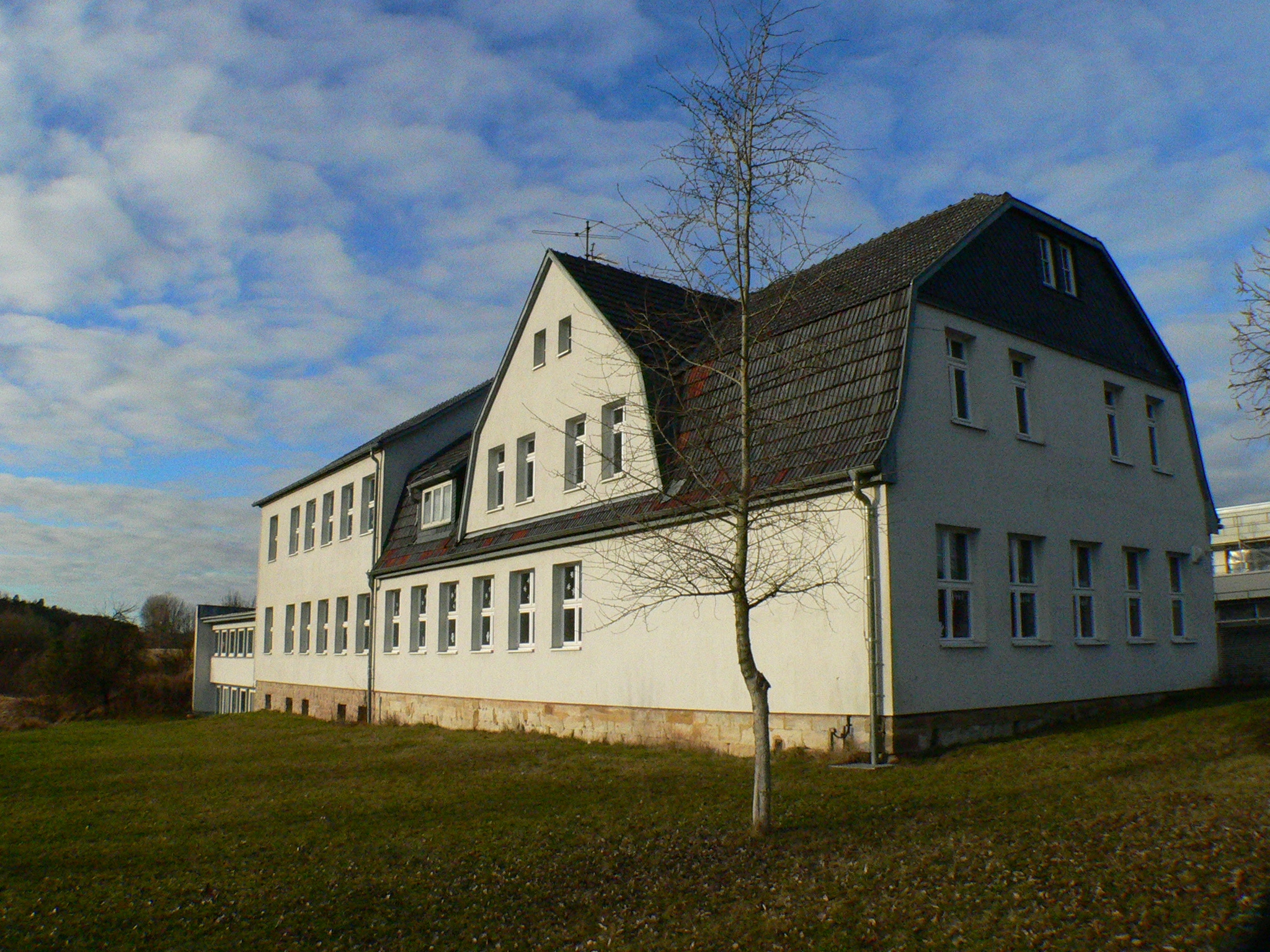 Coburg Stadtteil Scheuerfeld, Neue Schule von 1874